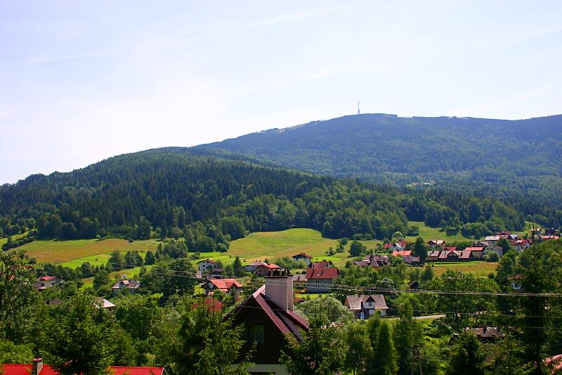 Szczyrk (Polska)